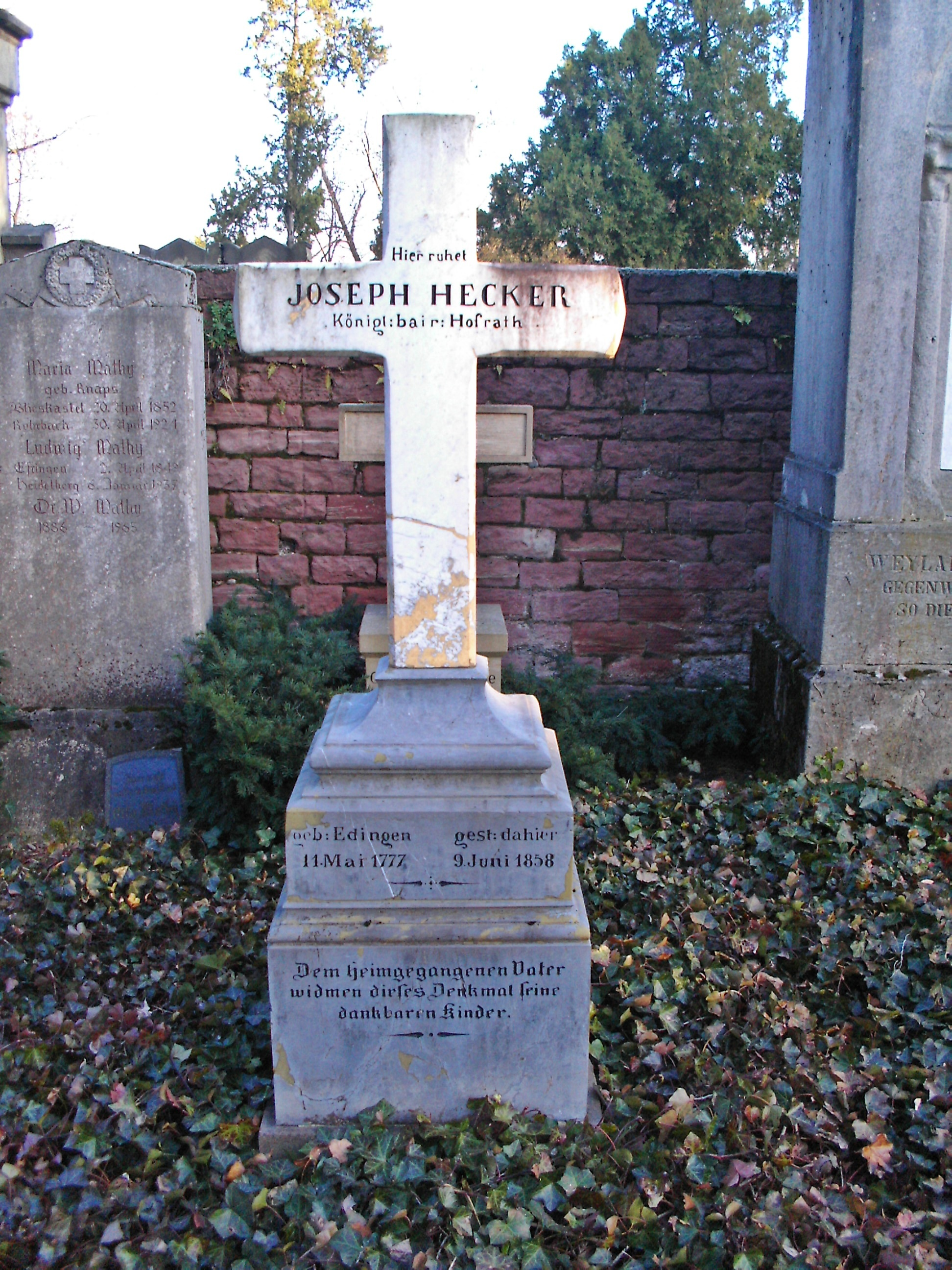 Grab von Joseph Hecker, dem Vater des Revolutionärs Friedrich Hecker, auf dem Hauptfriedhof Mannheim